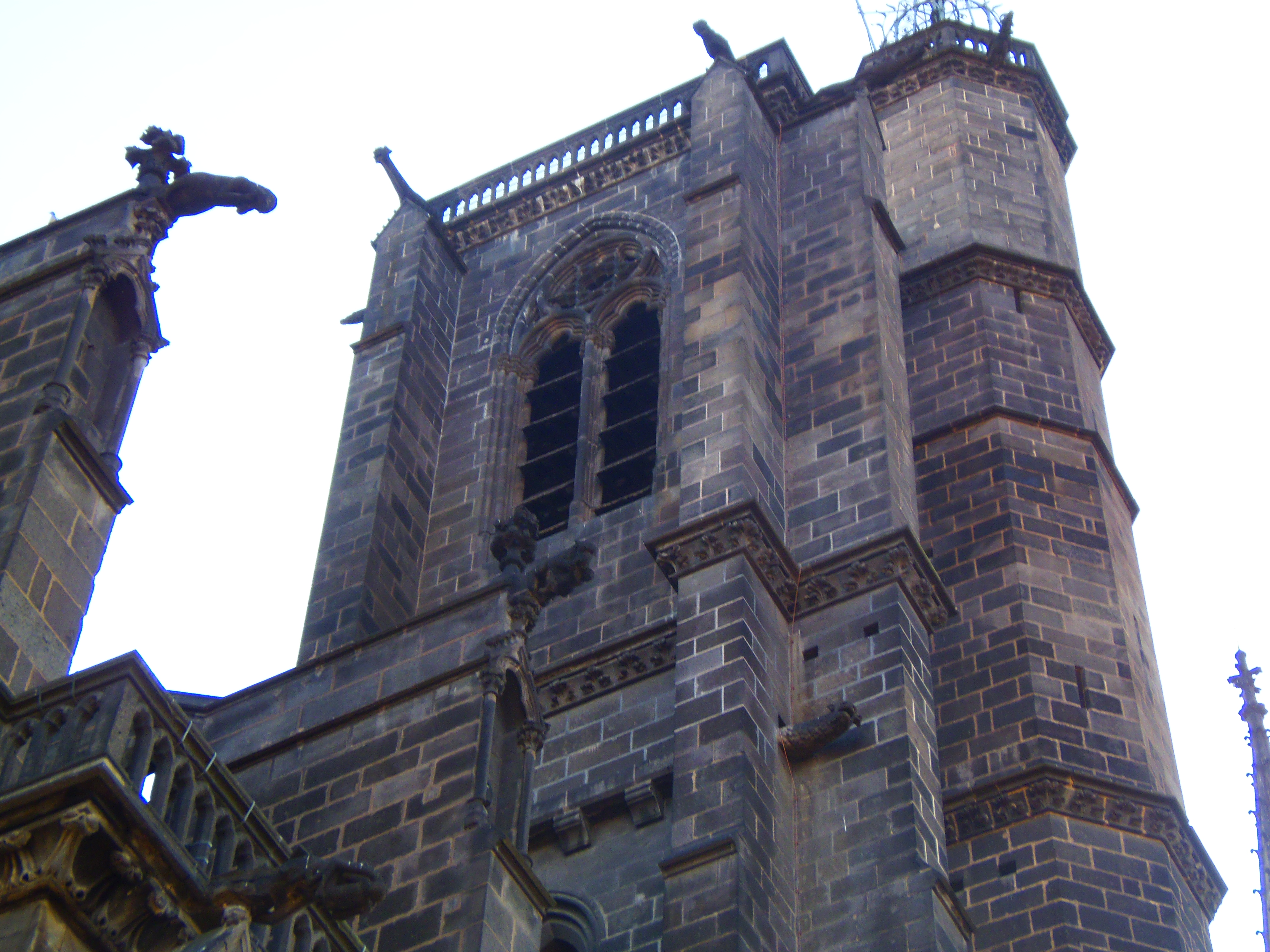 Cathédrale Notre-Dame-de-l'Assomption de Clermont-Ferrand (Puy-de-Dôme, France). Tour de la Bayette.